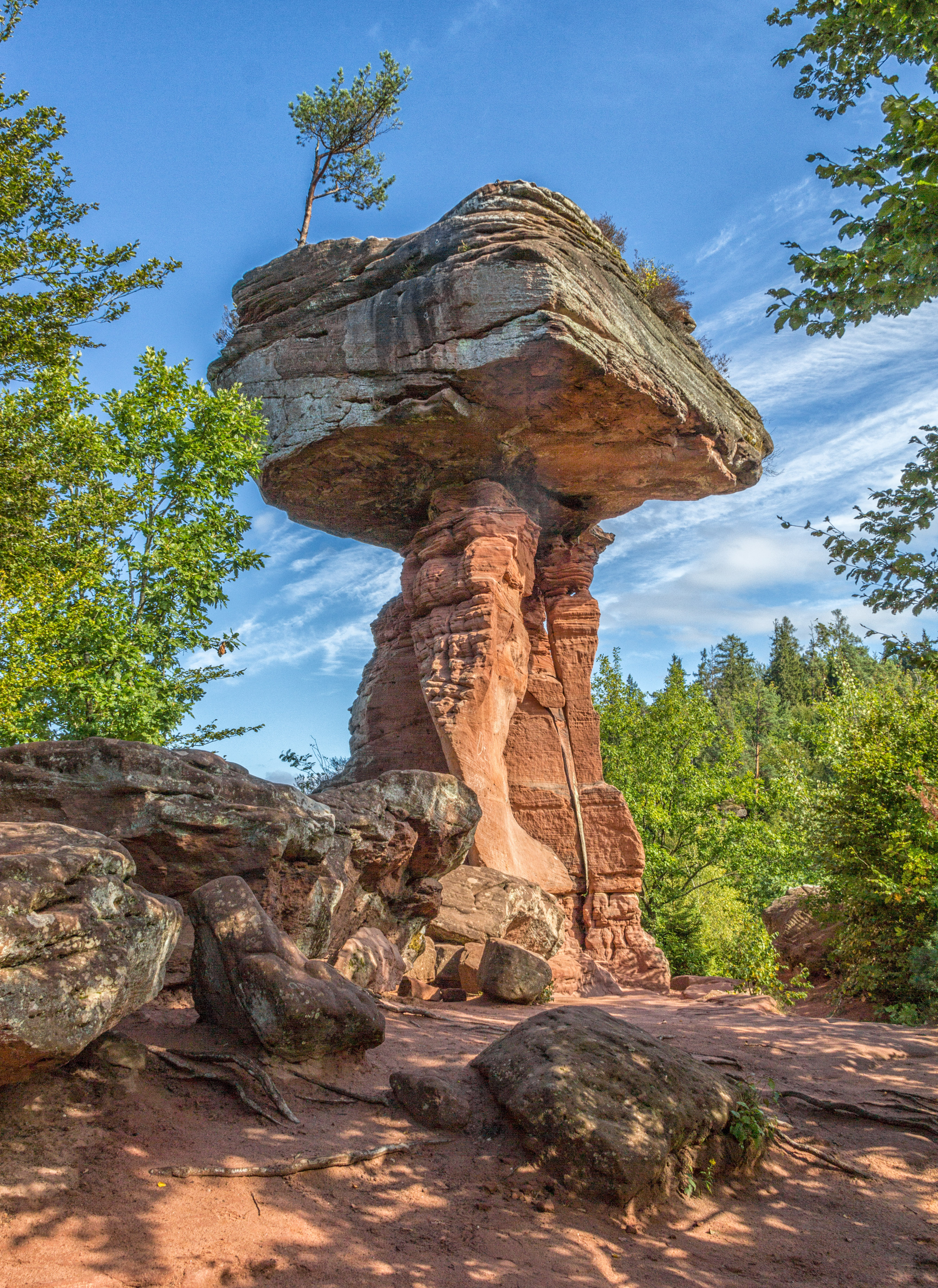 Teufelstisch, Geotop, Naturdenkmal, Naturpark Pfälzerwald, Hinterweidenthal